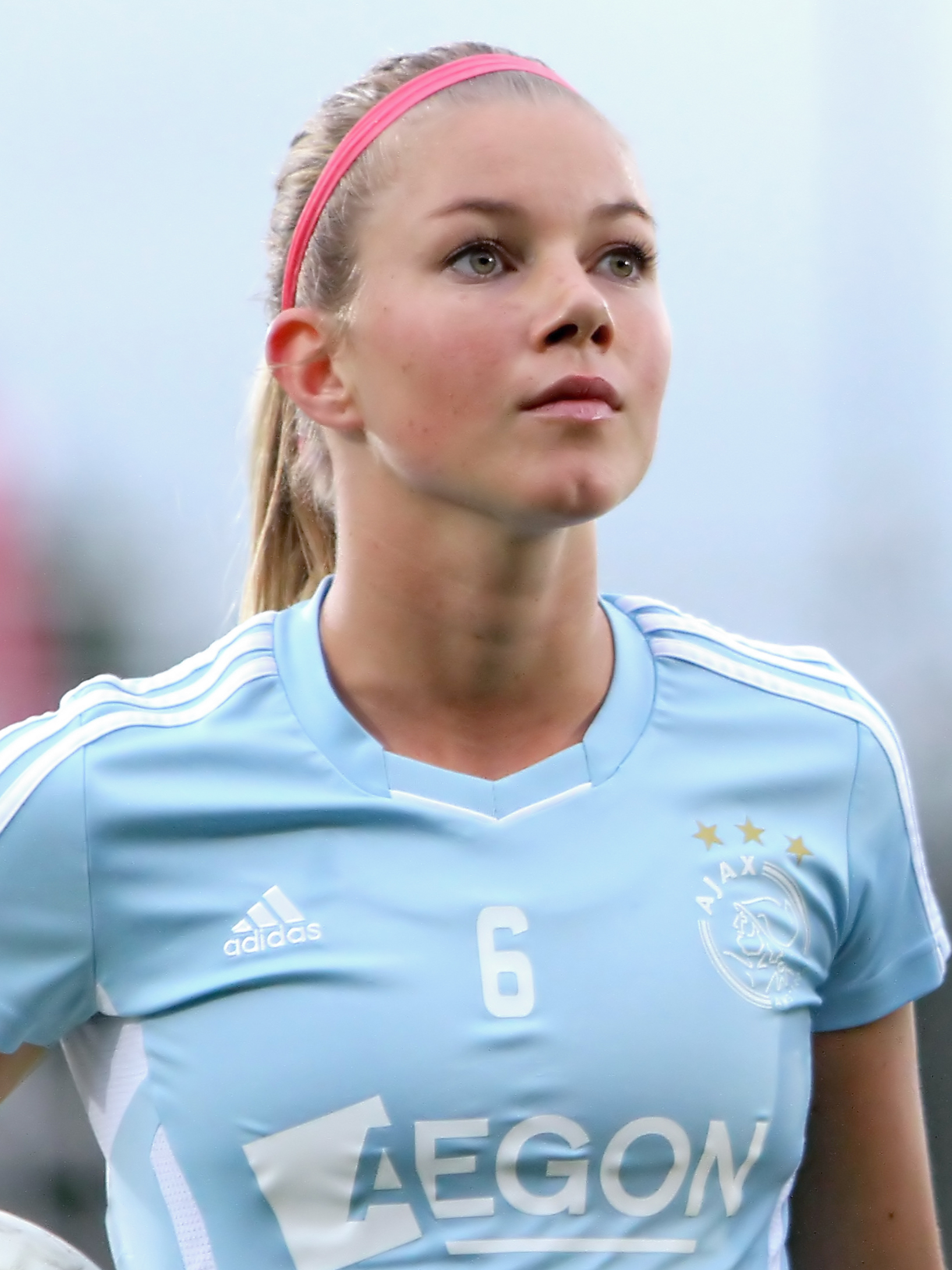 Anouk Hoogendijk tijdens de warming up voor een wedstrijd van de Ajaxvrouwen.